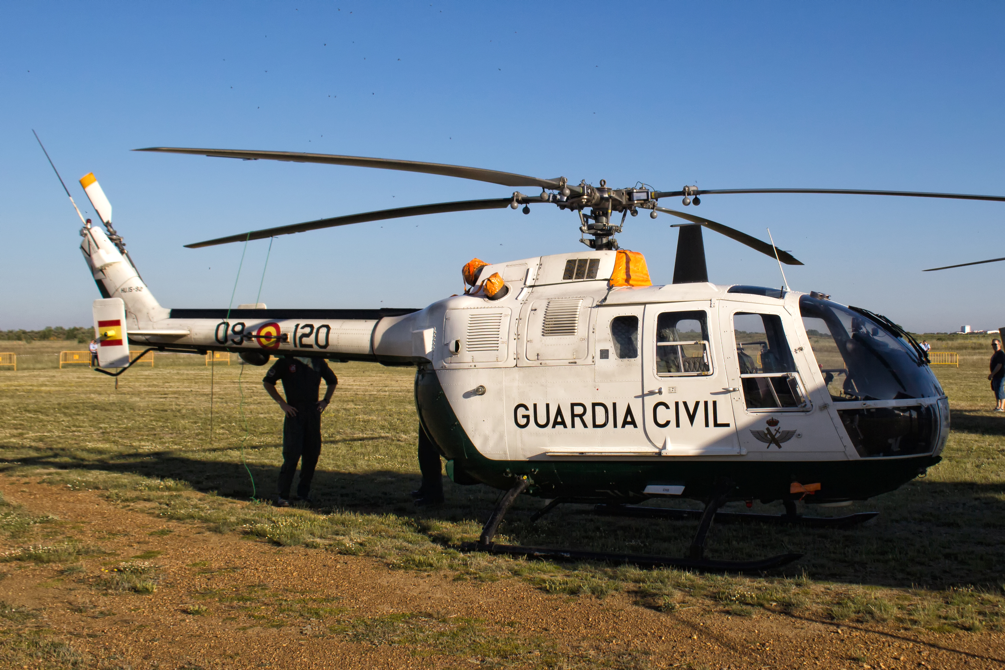 Bo 105 da Guardia Civil na exposición estática dos actos polo 25 aniversario da Academia Básica do Aire de León.